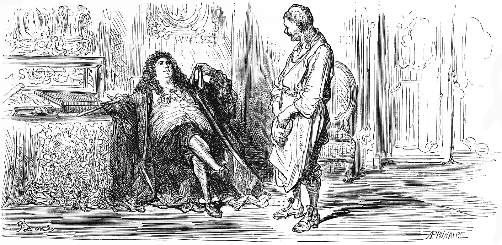 grafika z książki PL Bajki, Jean de La Fontaine, nakładem i drukiem Jana Noskowskiego, Warszawa 1876